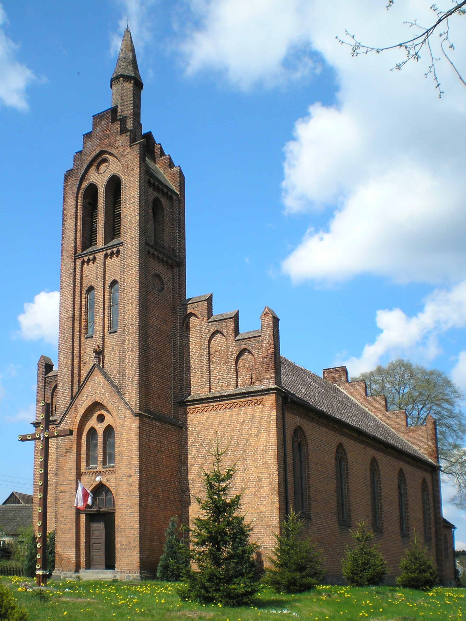 Kosobudz - rzymskokatolicki kościół filialny pw. Matki Bożej Częstochowskiej